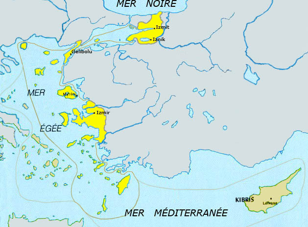 Eyalet/pachalik de la "Djezireh des Îles" avant 1832 (jaune gris) et après 1878 (jaune vif)